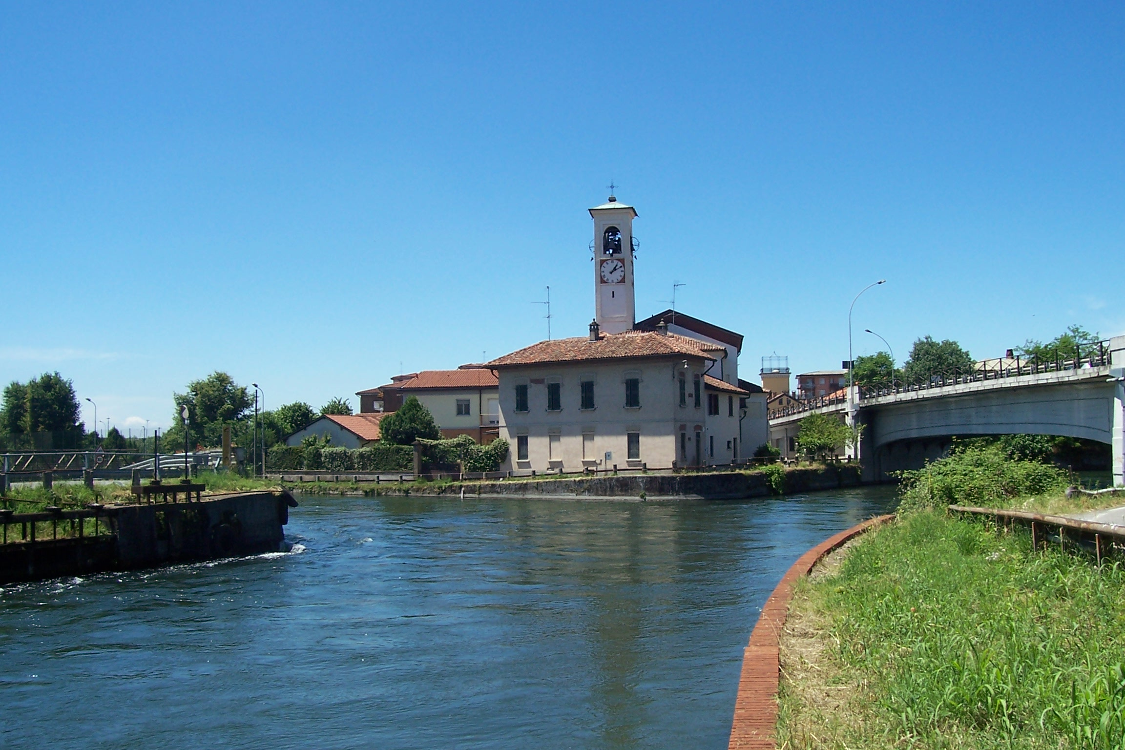 Incile Naviglio di Bereguardo (Sinistra) da Naviglio Grande (Destra) a Castelletto di Abbiategrasso